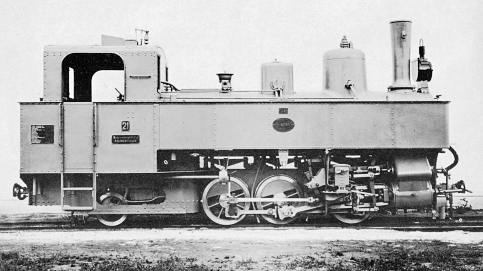 en: Locomotive No. 21 (later Uv.2 and ÖBB 298.206) of the Waldviertler Schmalspurbahnen in Lower Austria, work's photograph de: Lokomotive 21 (später Uv.2 und ÖBB 298.206) der Waldviertler Schmalspurbahnen, Werksfoto